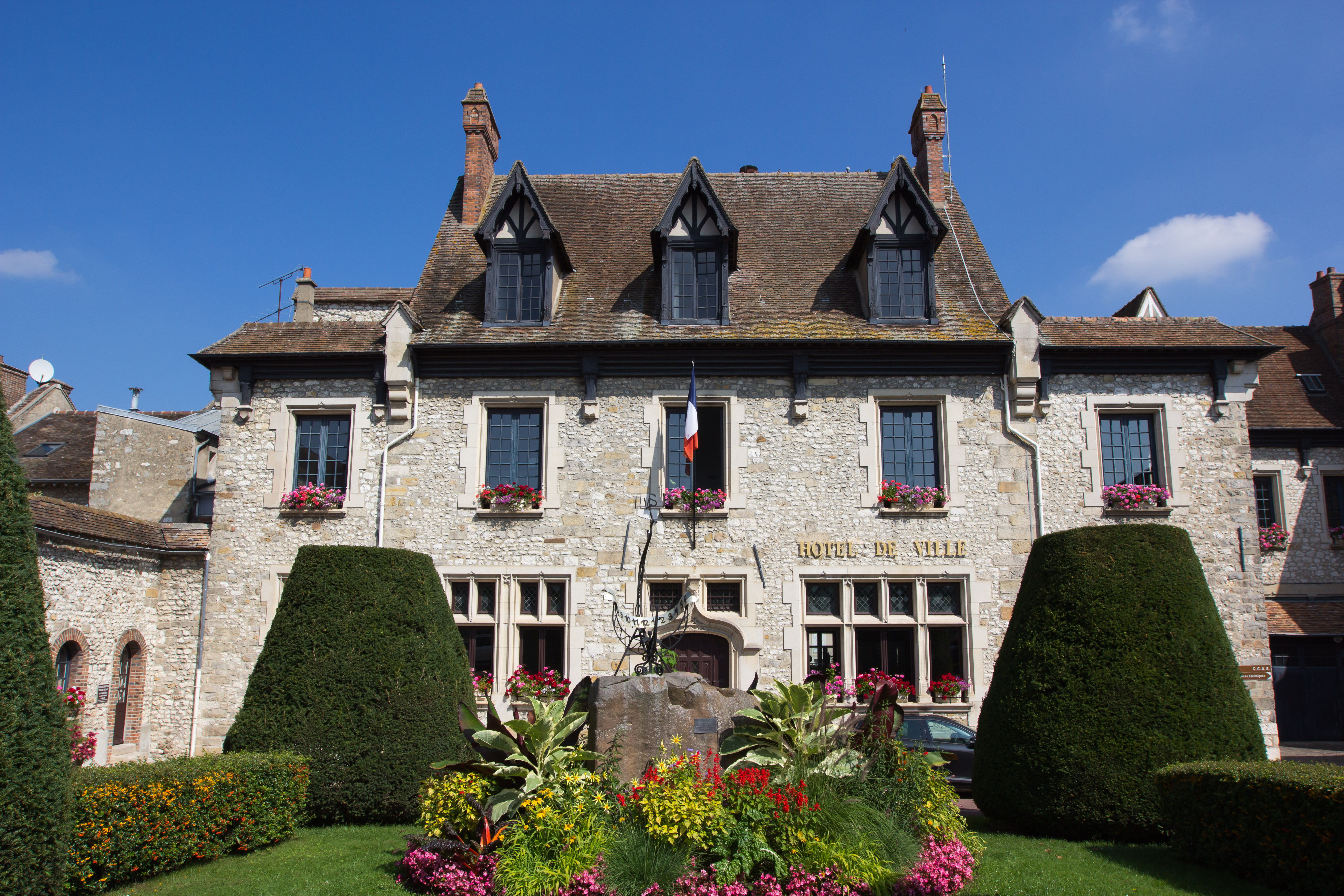 Ancien hôtel de ville de Moret-sur-Loing (Seine-et-Marne, France)